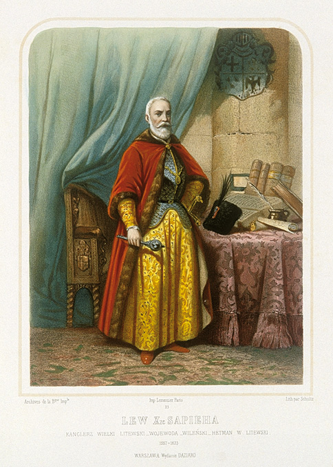 Беларуская (тарашкевіца): Партрэт Льва Сапегі (Leŭ Sapieha)